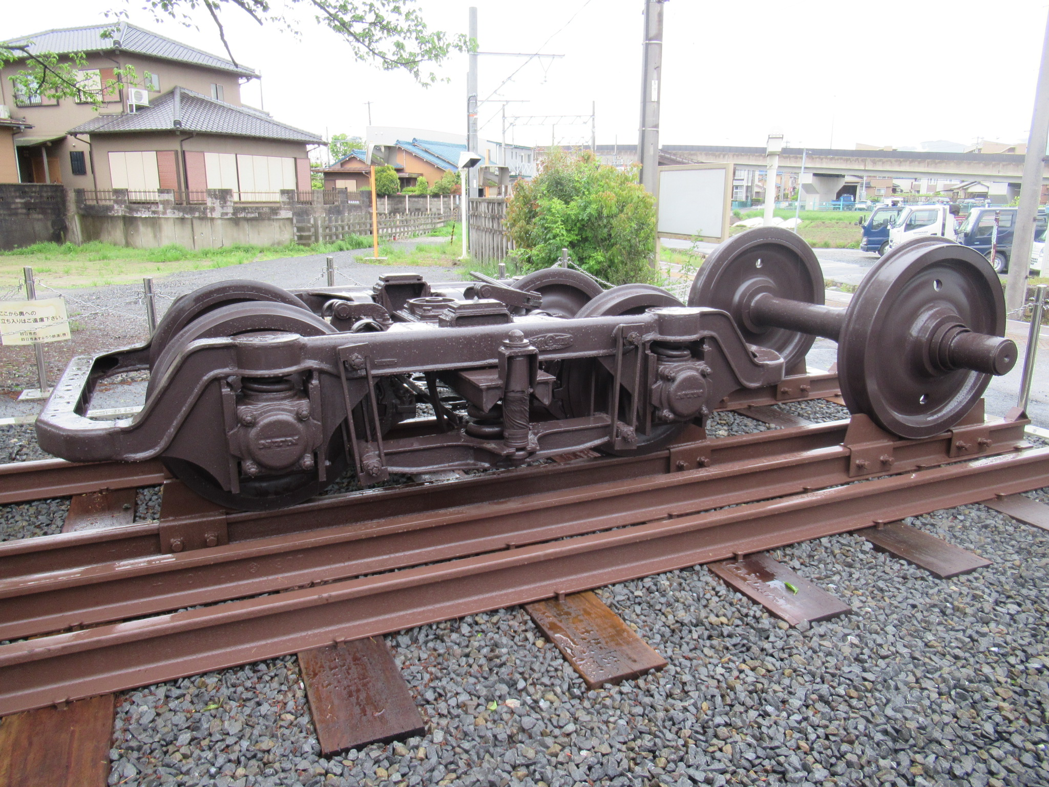 日永駅の特殊狭軌線台車・三軌間レール展示